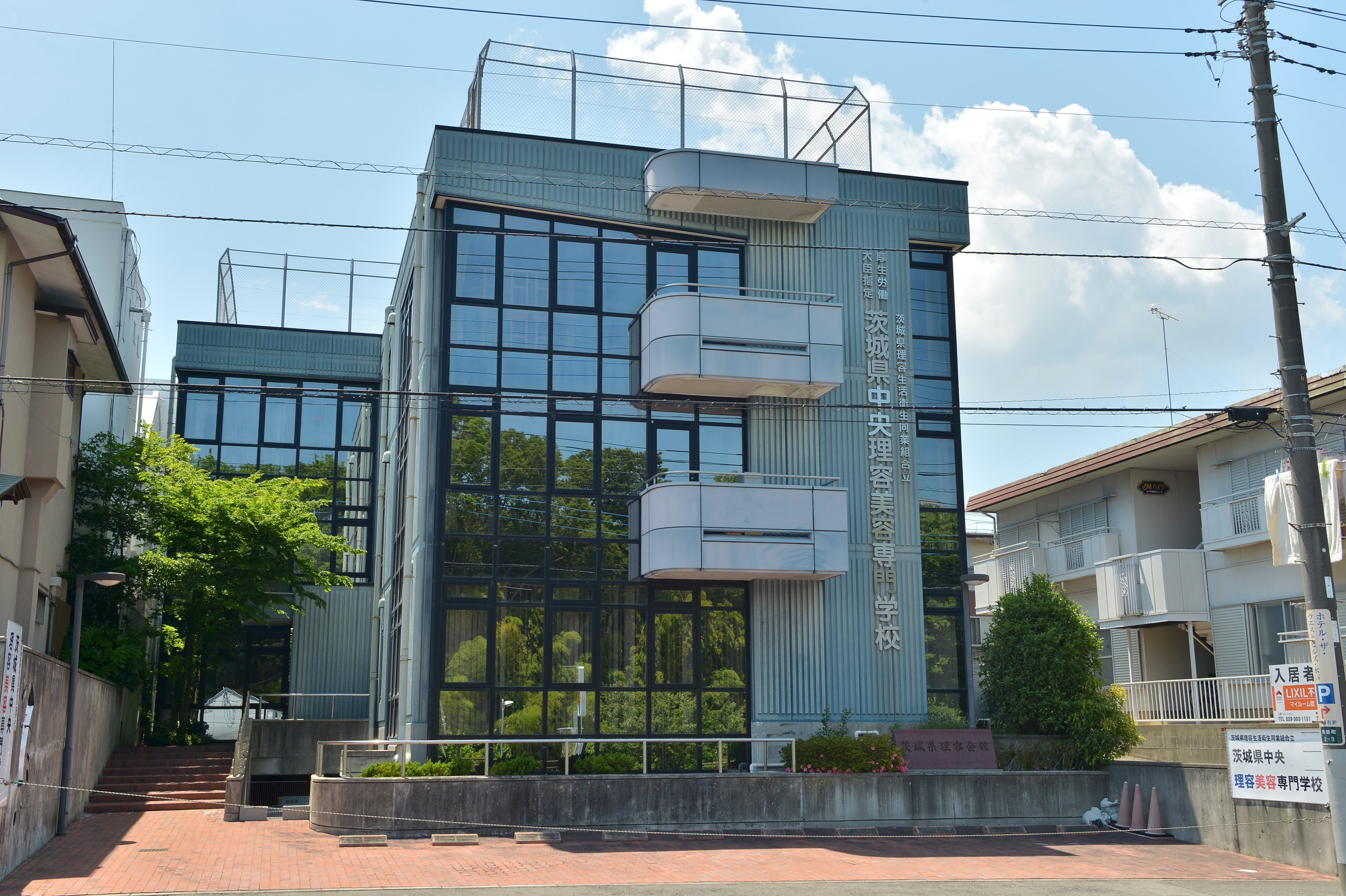 茨城県水戸市に所在する、茨城県中央理容美容専門学校